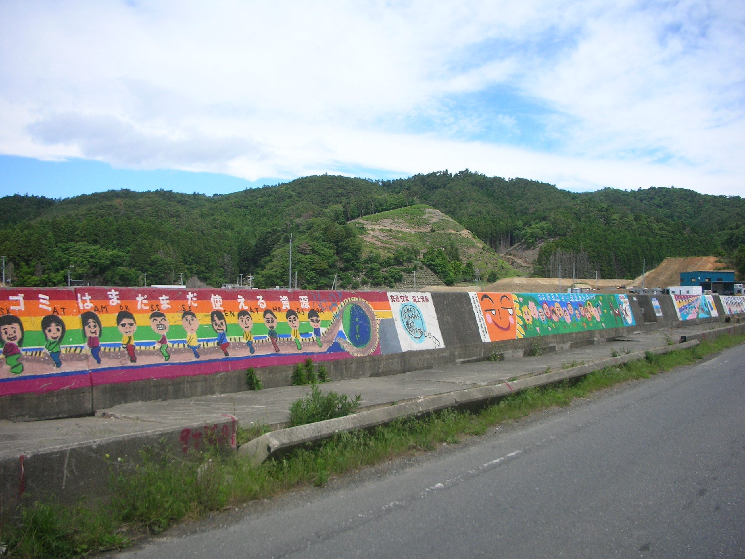 宮城県道2号大原小学校近く